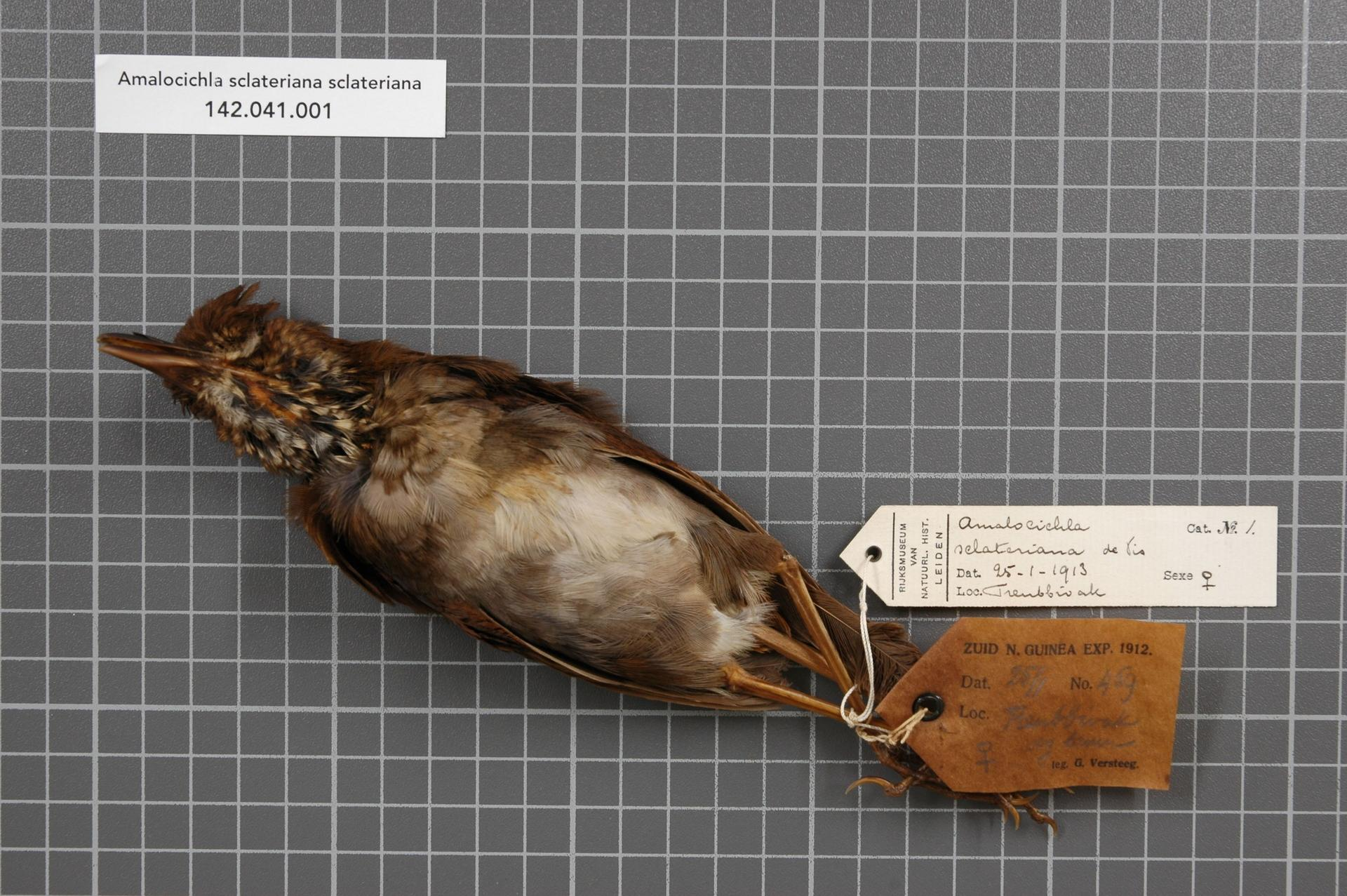 Amalocichla sclateriana sclateriana De Vis, 1892